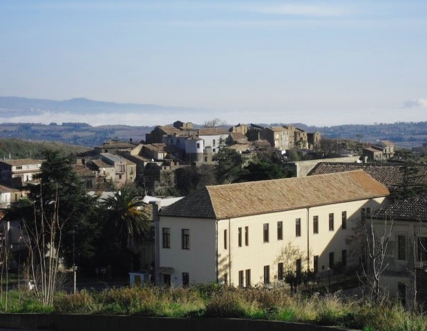 Vista sul rione Pioppi Vecchi, il più antico nucleo urbano di Girifalco, da dietro il Complesso Monumentale (ex manicomio).